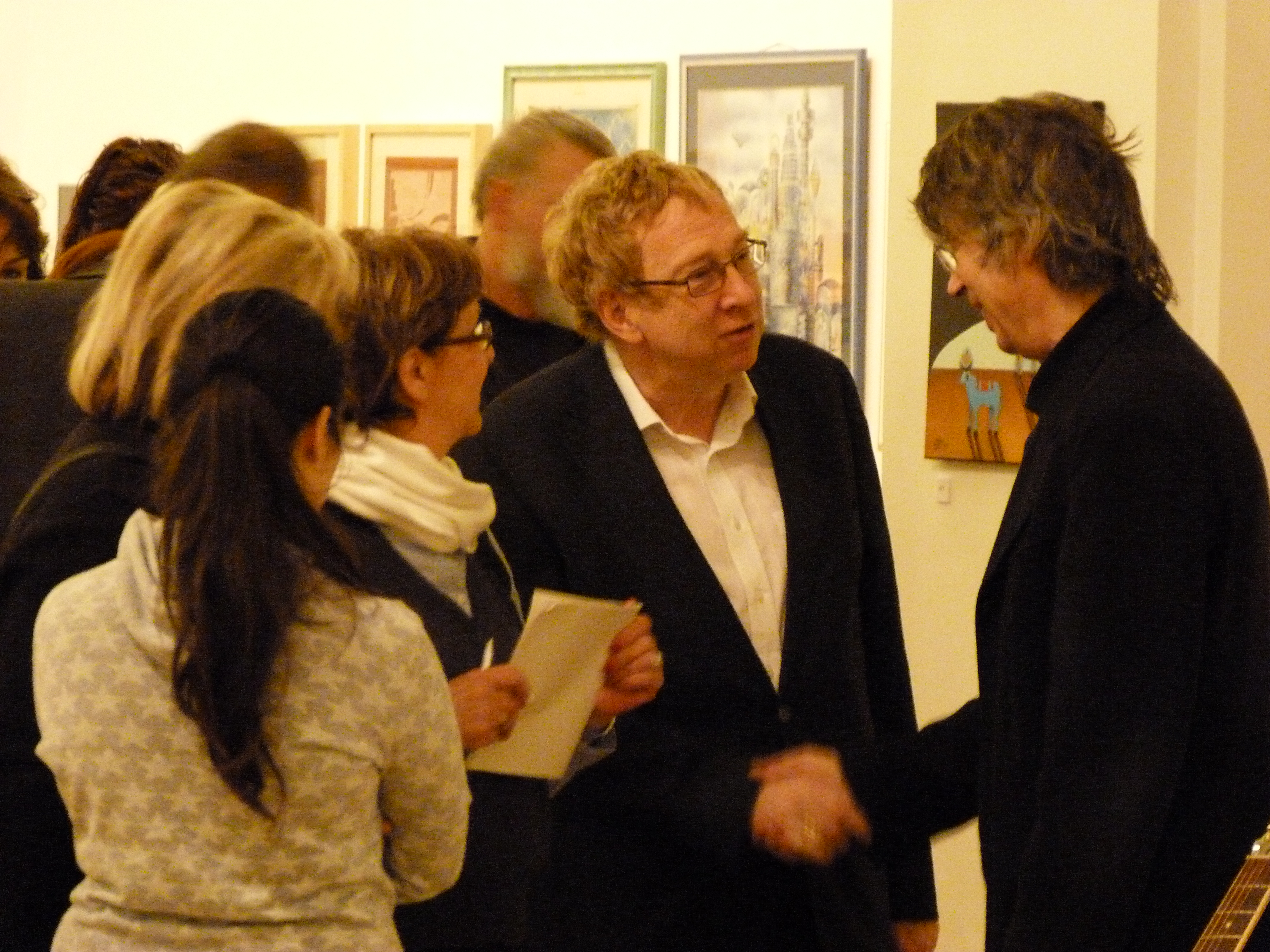 Bródy János a Centrális Galériában 2011-ben.